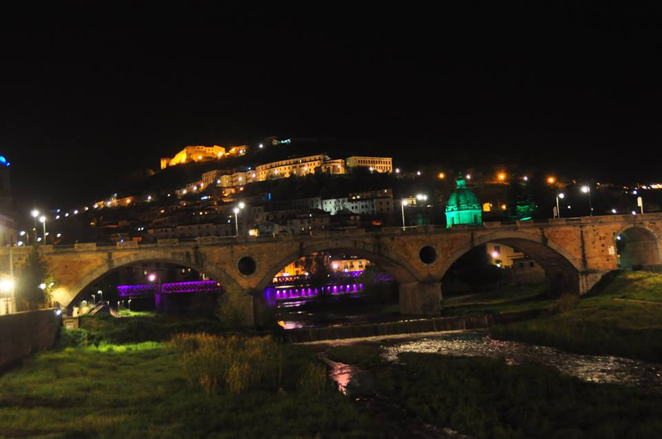 Scorcio notturno centro storico di Cosenza